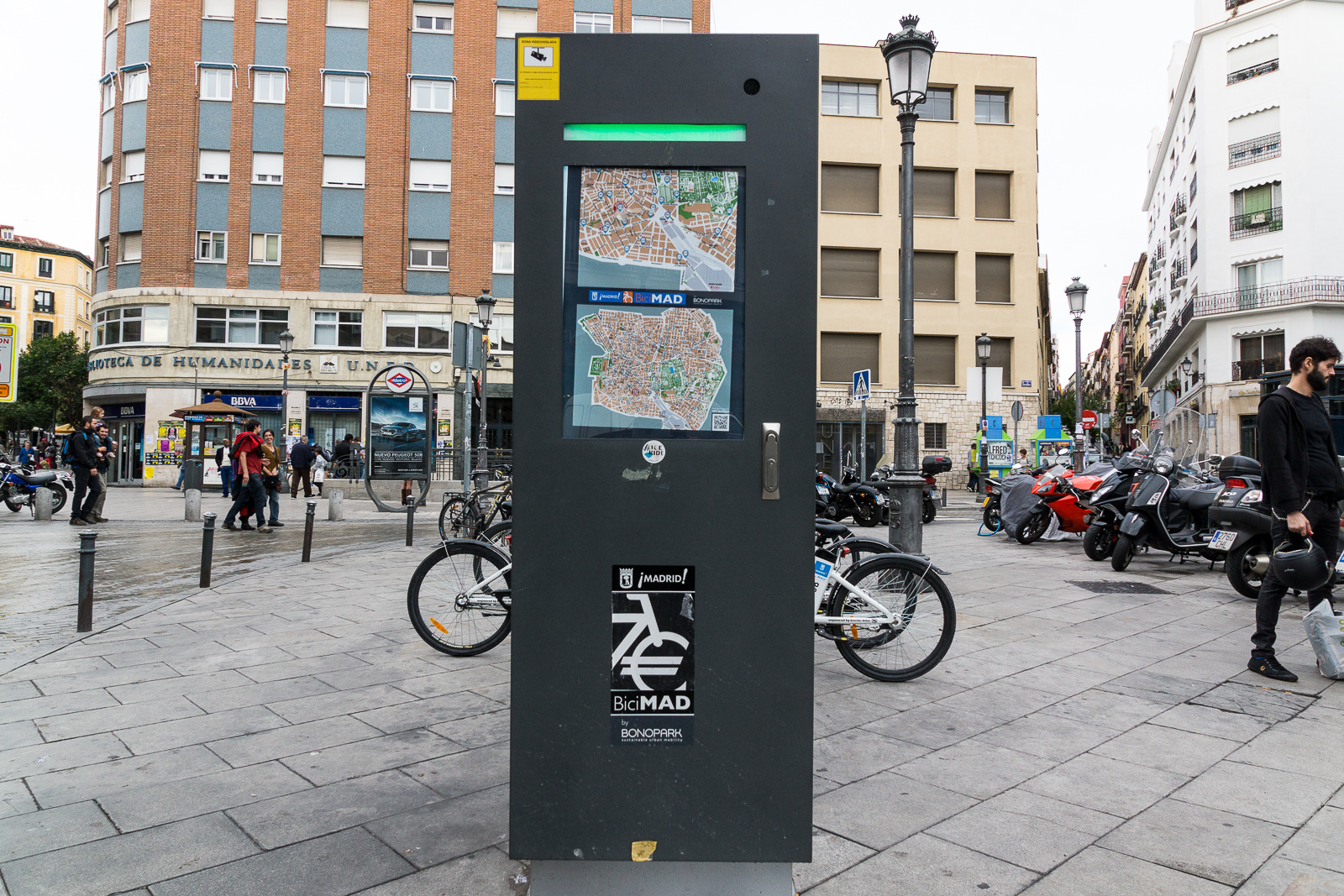 Estación de BiciMad junto a la plaza de Lavapiés